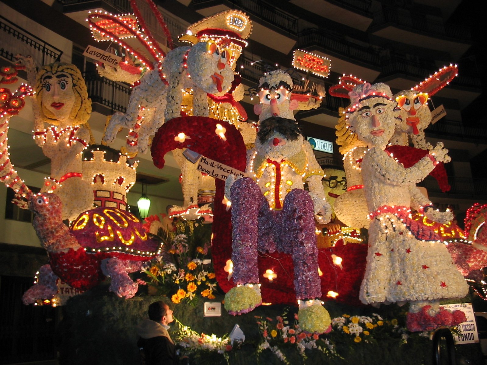 Carro infiorato Carnevale di Acireale (2005), preso da [1]